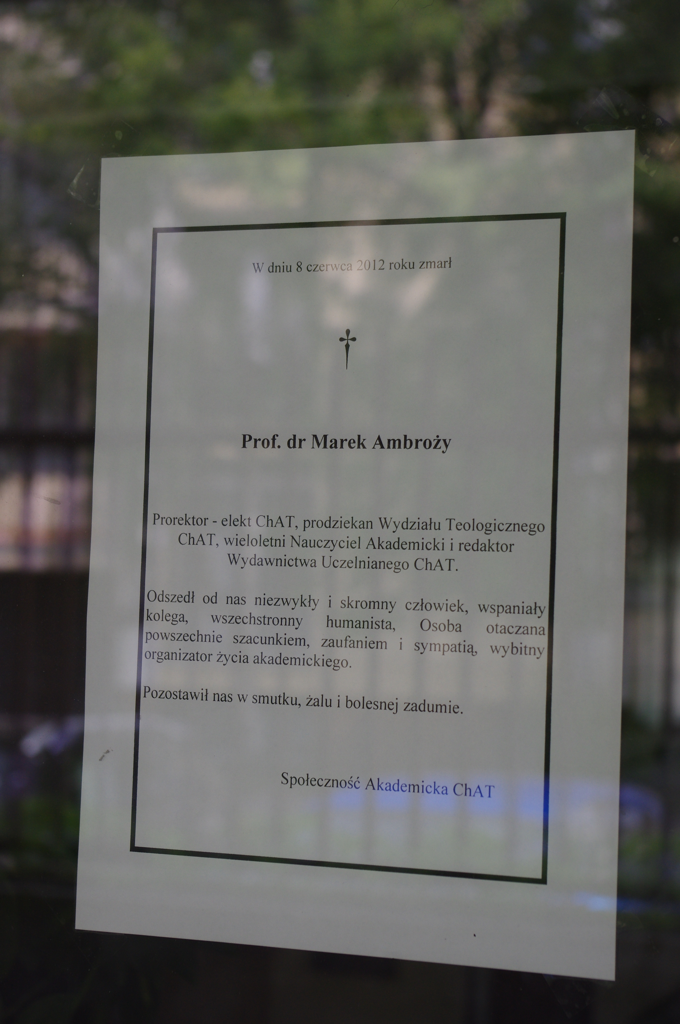 Nekrolog prof. Marka Ambrożego – prorektora-elekta Chrześcijańskiej Akademii Teologicznej w Warszawie na budynku uczelni w dniu pogrzebu (12 czerwca 2012)